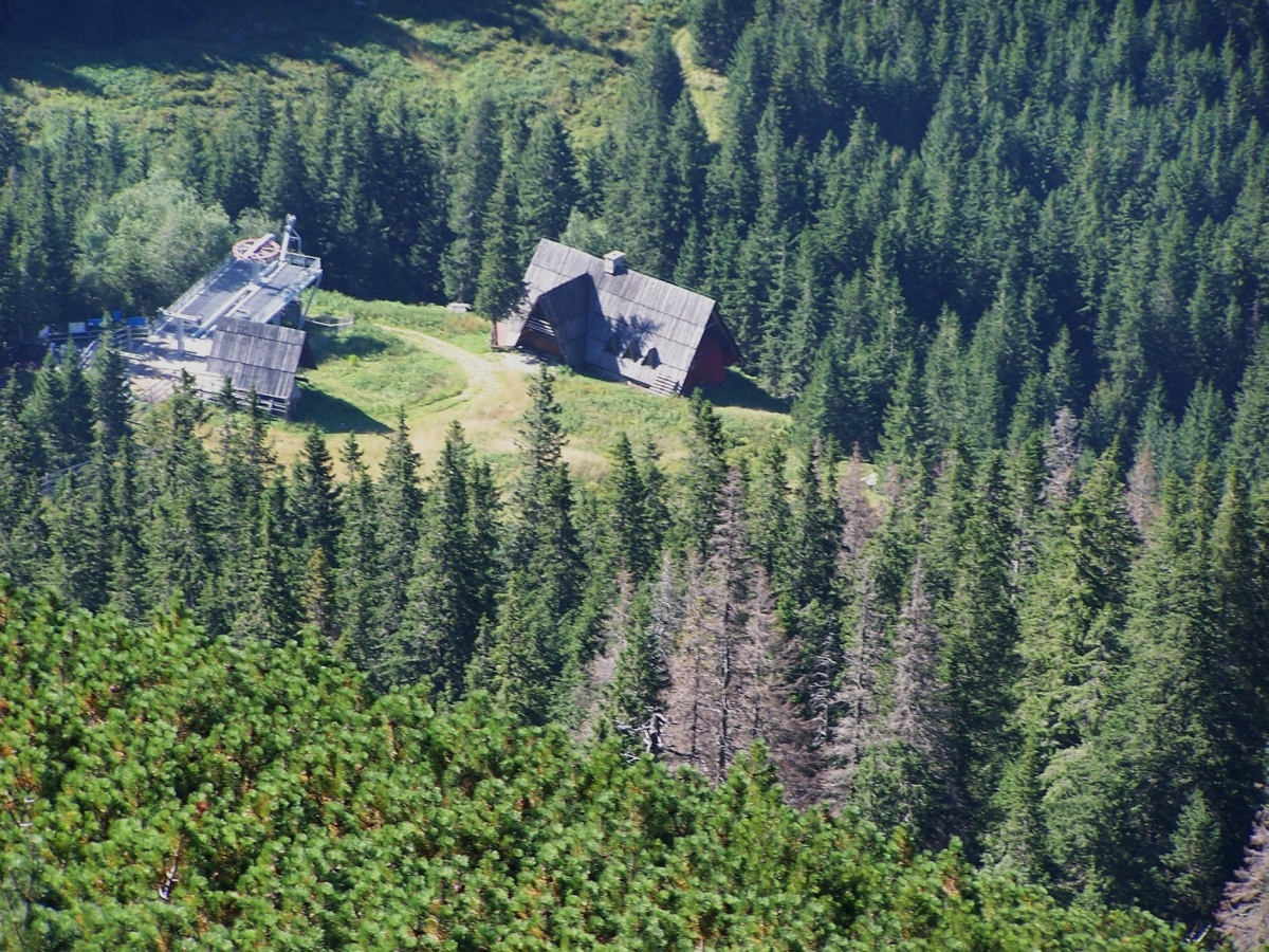 Goryczkowa Rówień Wyżnia i dolna stacja Kolejki Krzesełkowej Goryczkowej